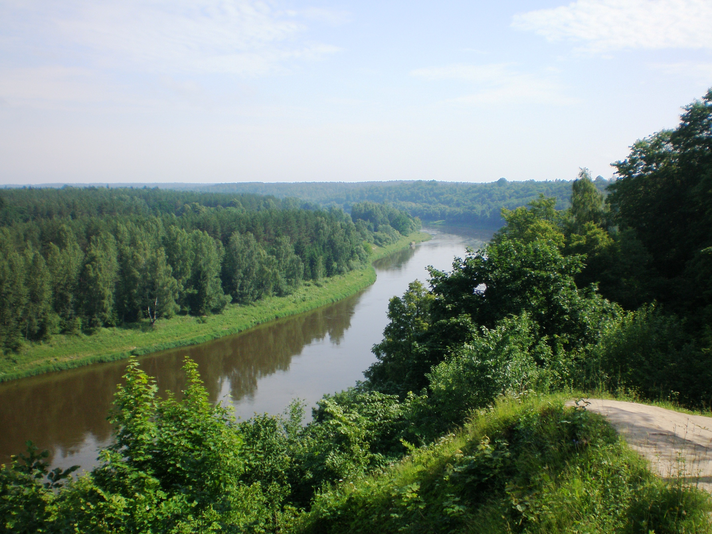 Nemunas nuo Punios piliakalnio, Alytaus raj.